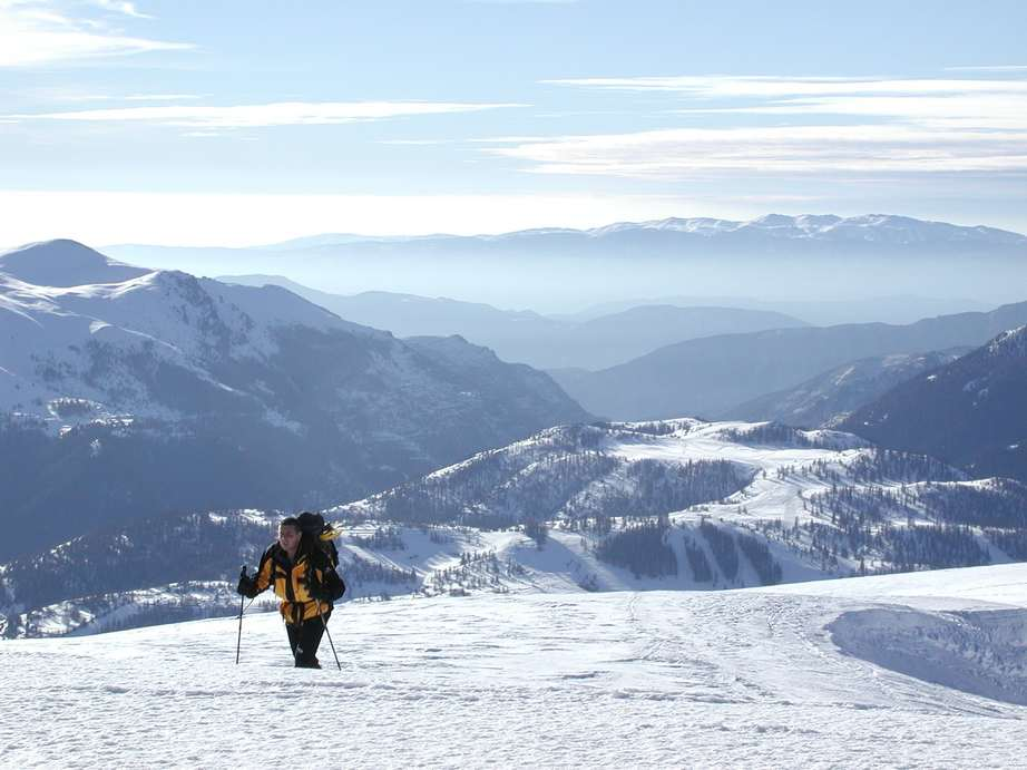 les alpes (Massif du Mercantour)